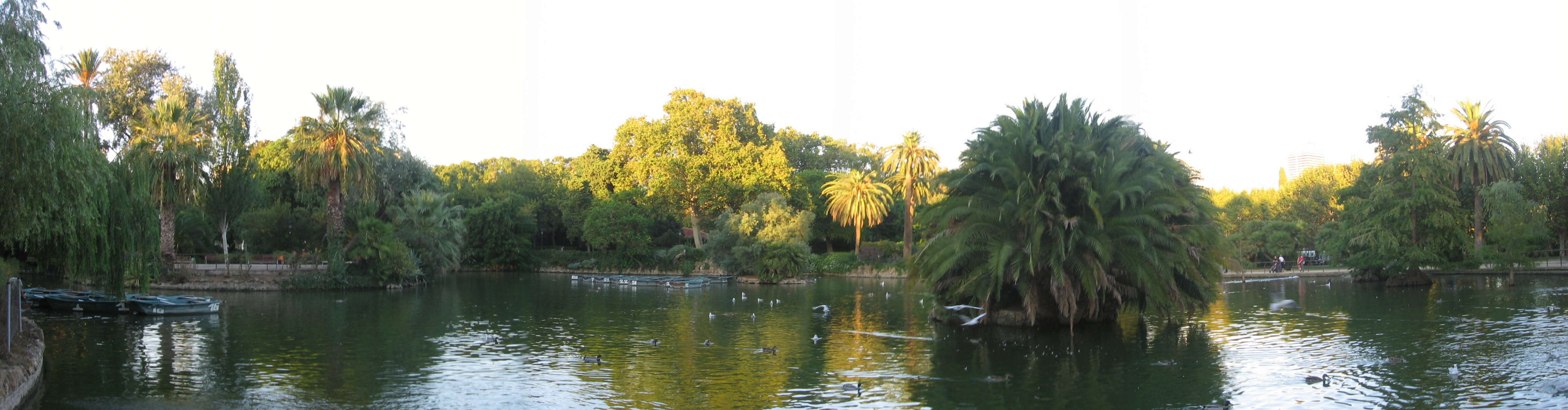 Lago de la Ciudadela.